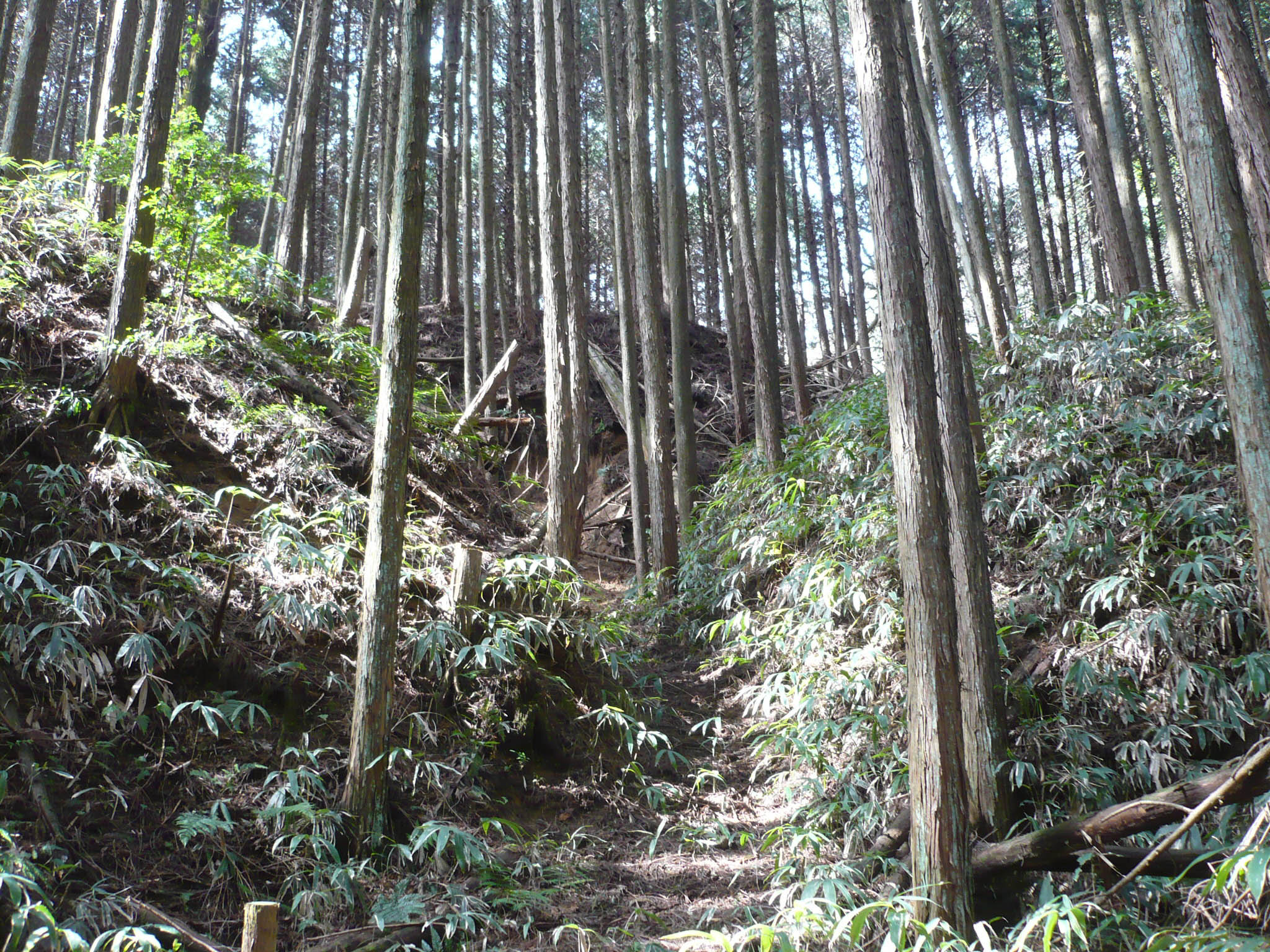 大手から主郭方向を撮影